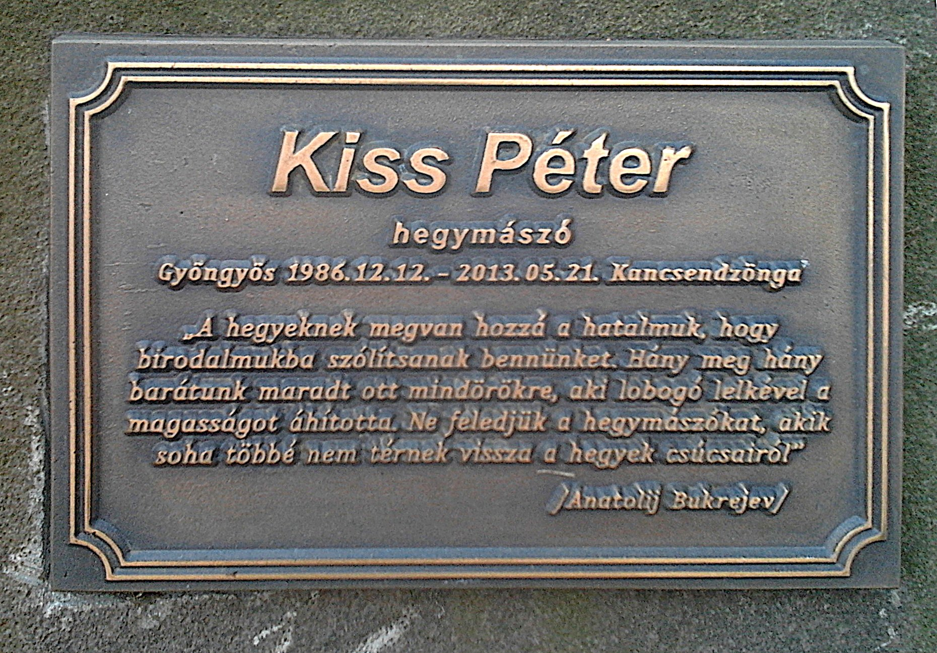 Kiss Péter emléktáblája a Kékestetőn.